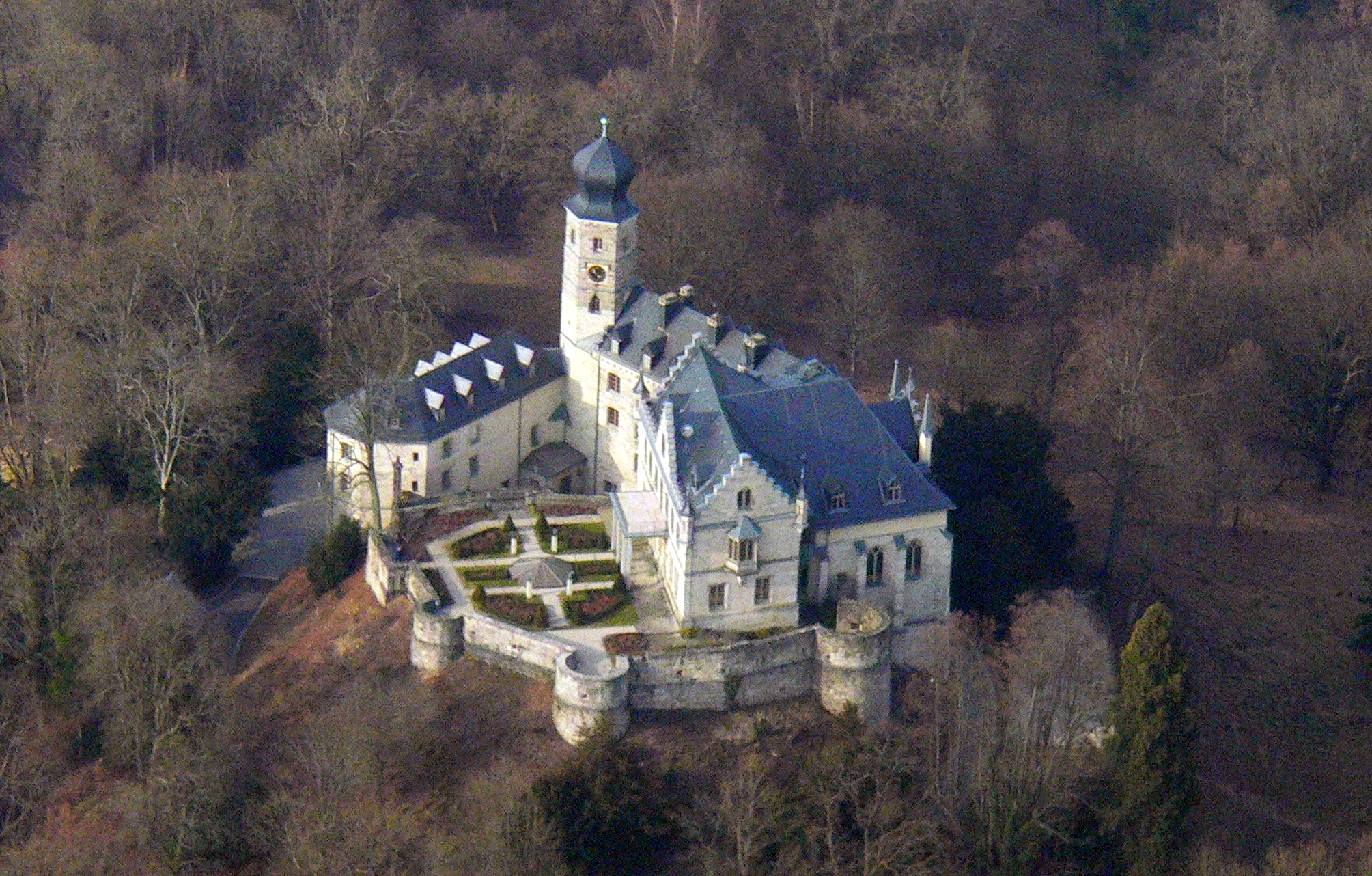 Schloss Callenberg in Coburg, Oberfranken, Bayern